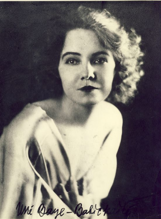 Unė Babickaitė